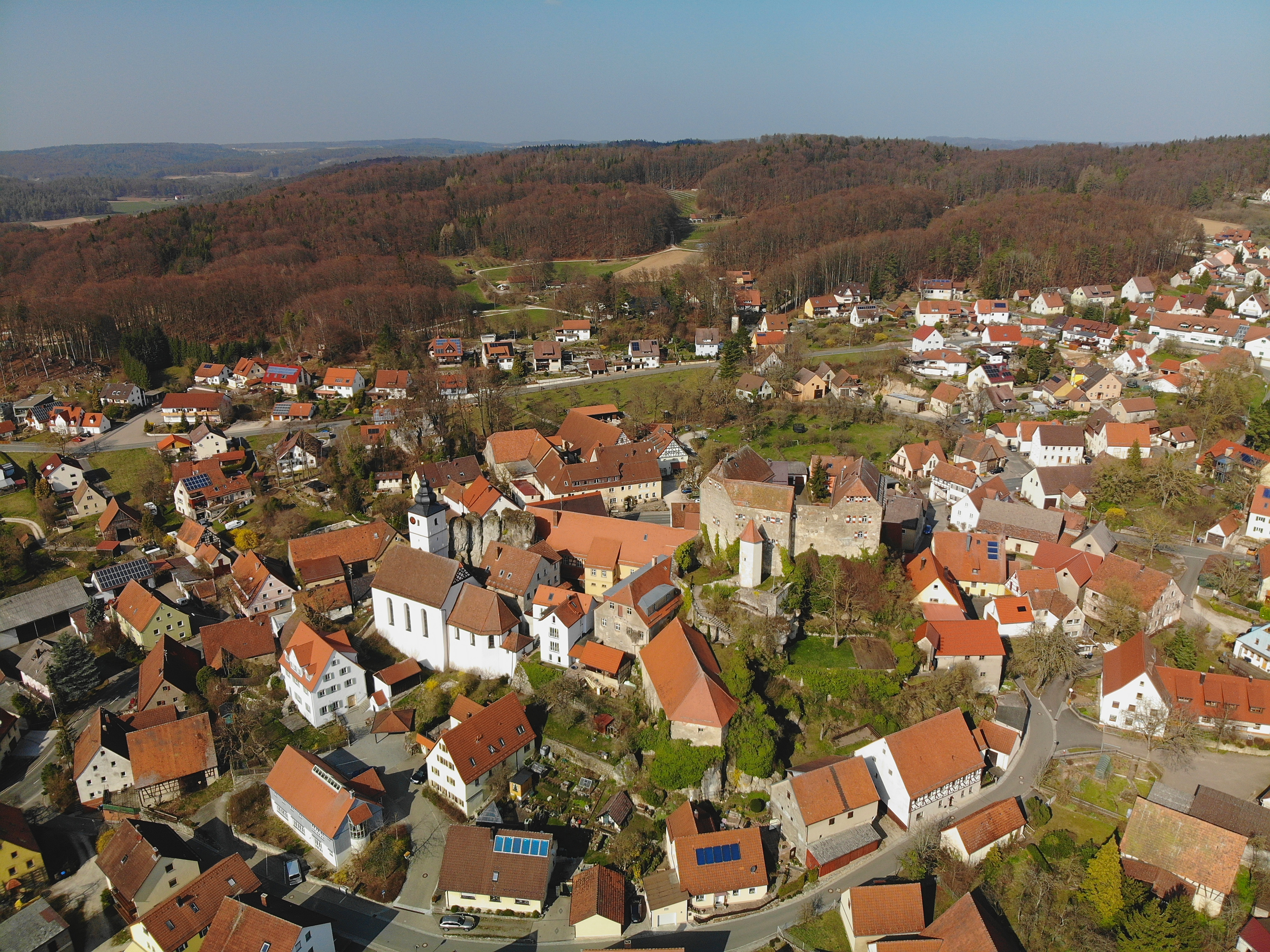 Burg Hiltpoltstein Luftaufnahme (2020)